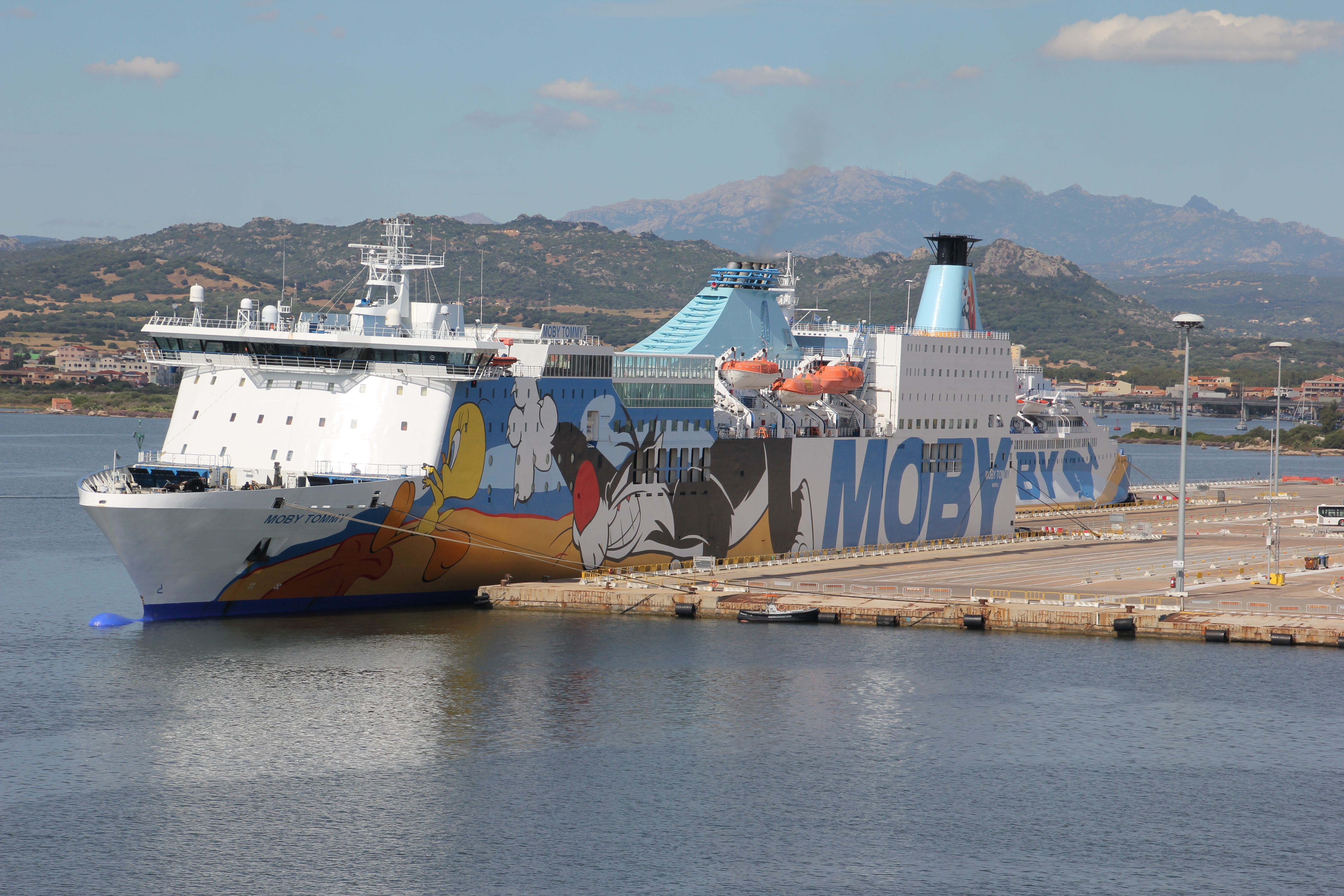 Moby Tommy